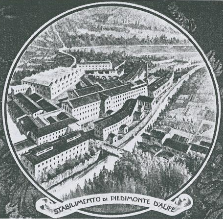 Stabilimento tessile di Piedimonte D'Alife (1812)